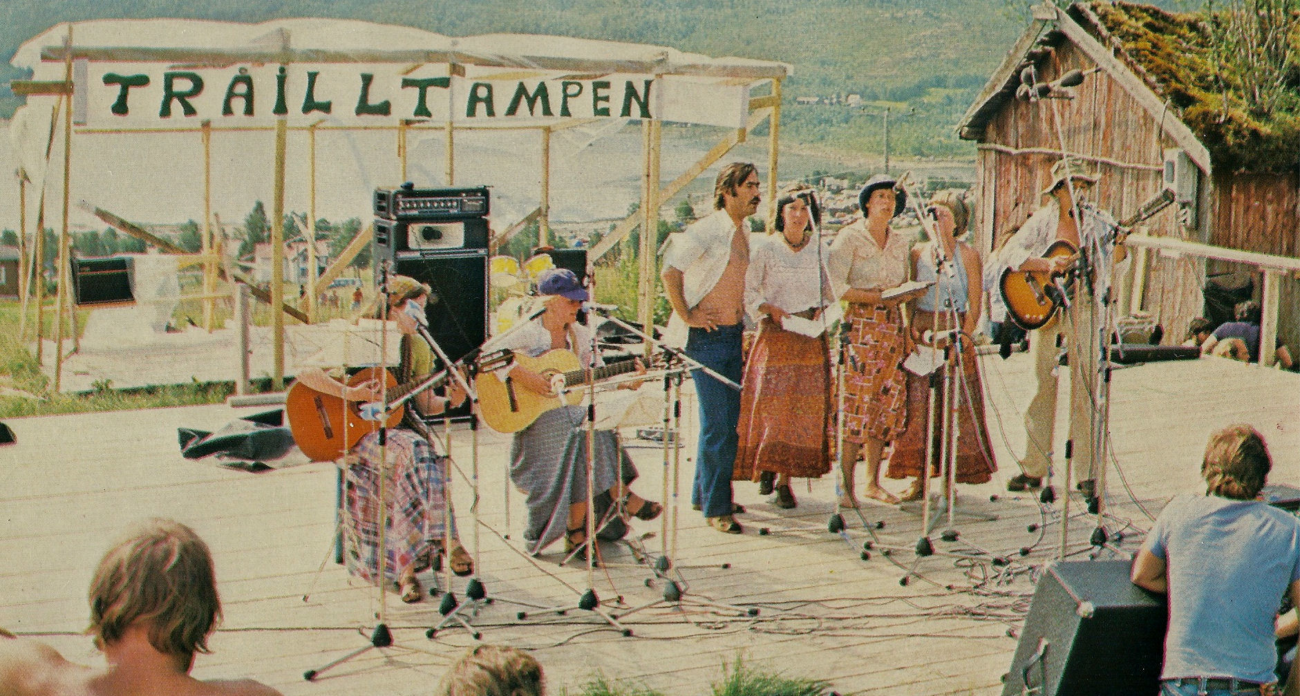 Tråilltampen 1978, Storjord i Tysfjord. Foto Idar Lind.